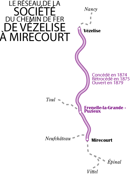 Carte du réseau de la société du chemin de fer de Vézelise à Mirecourt (1874-1875), dessinée par moi-même pour l'article éponyme.